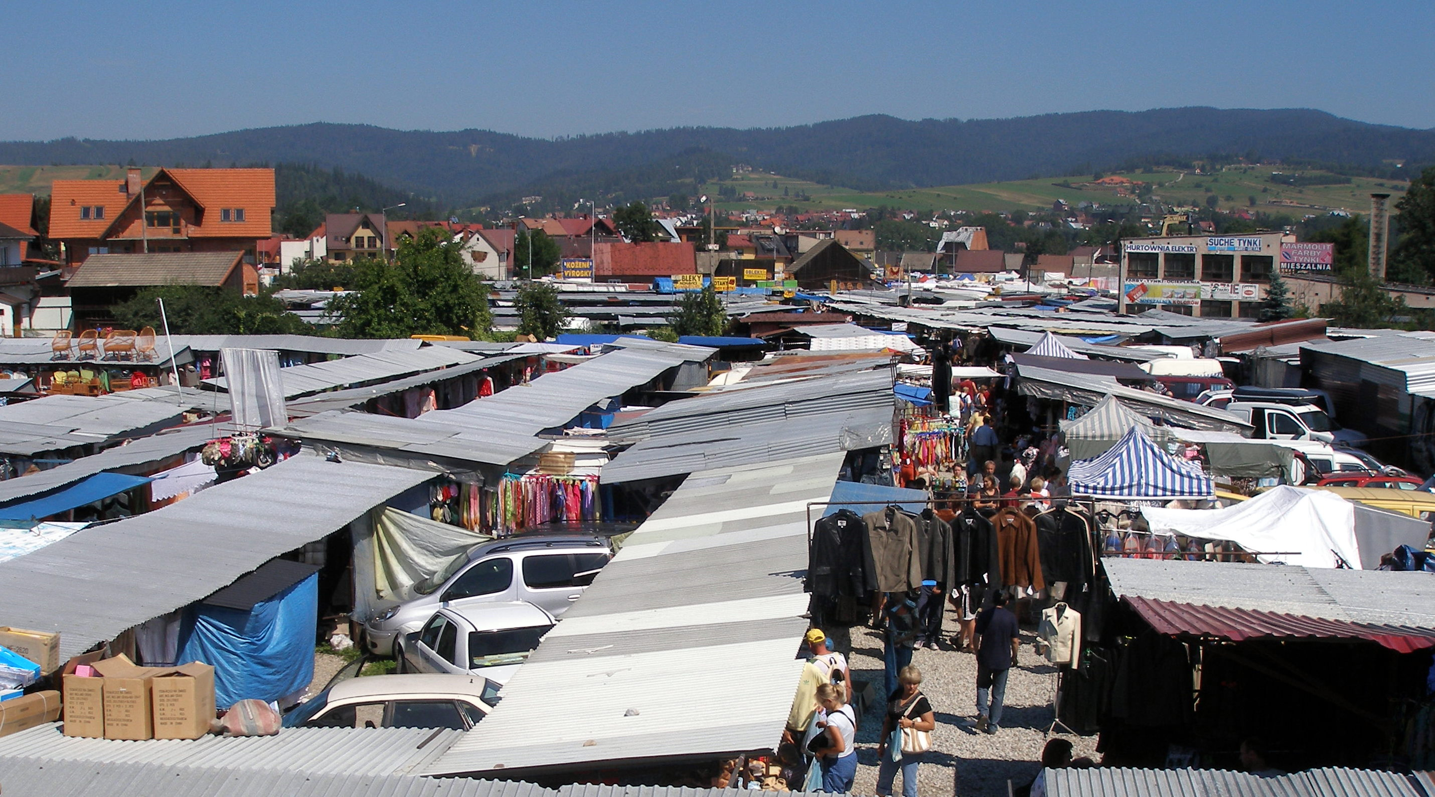 Priestory známeho a Slovákmi obľúbeného trhoviska v poľskom meste Nowy Targ.